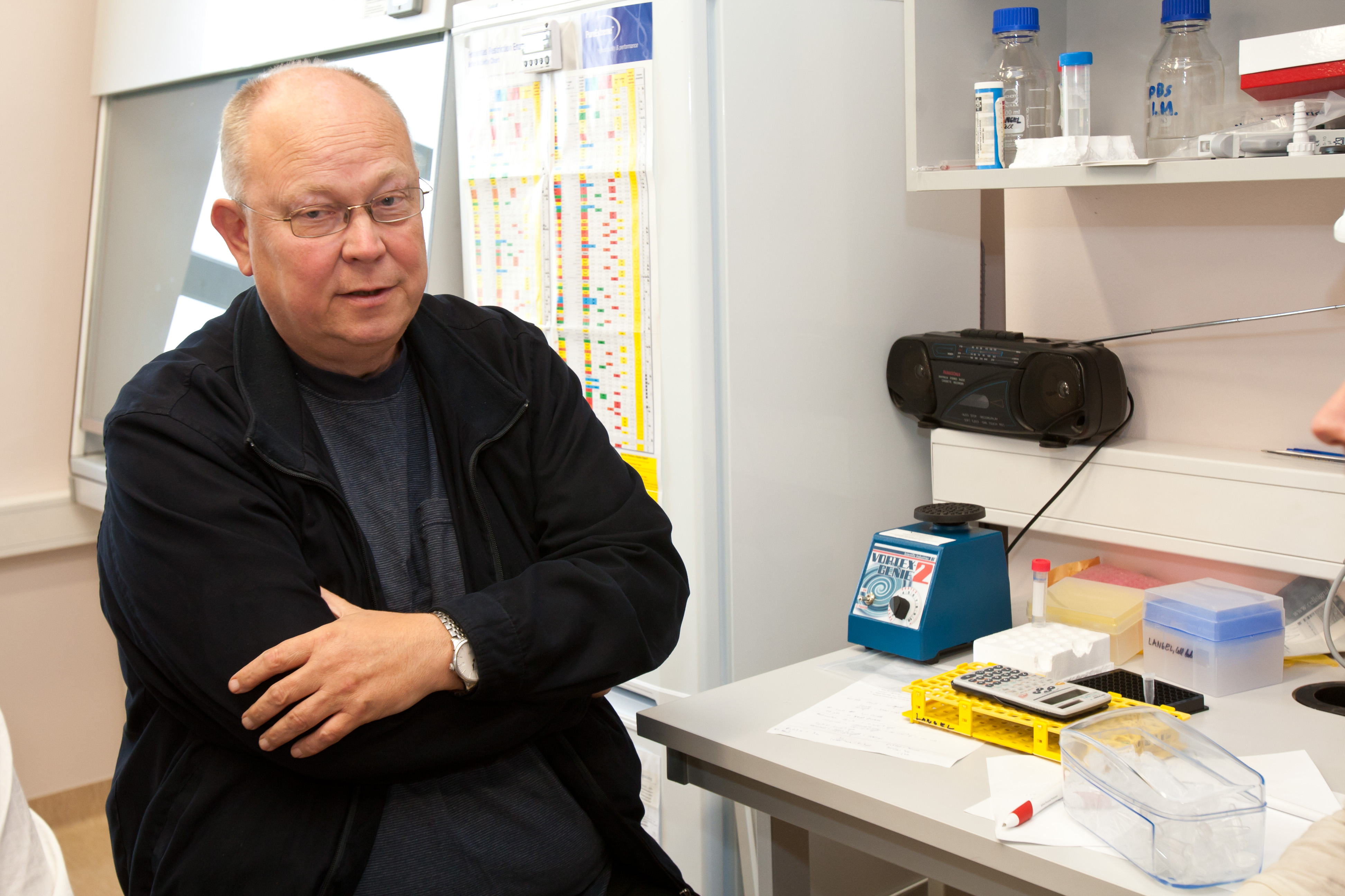 Ülo Langel, Stockholmi Ülikooli professor ja Tartu Ülikooli erakorraline professor.